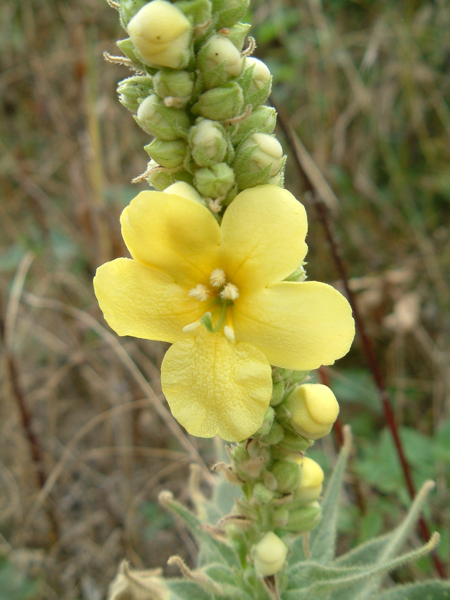 Molène faux Phlomis (bouillon blanc).